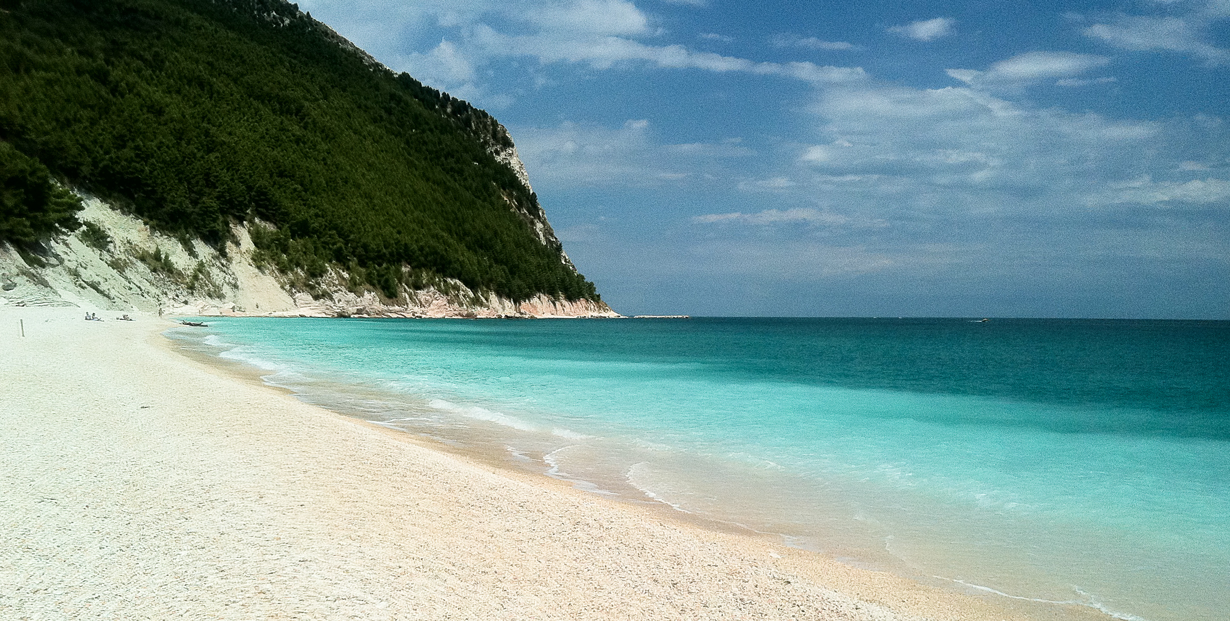 Spiaggia di Sirolo, Italia.